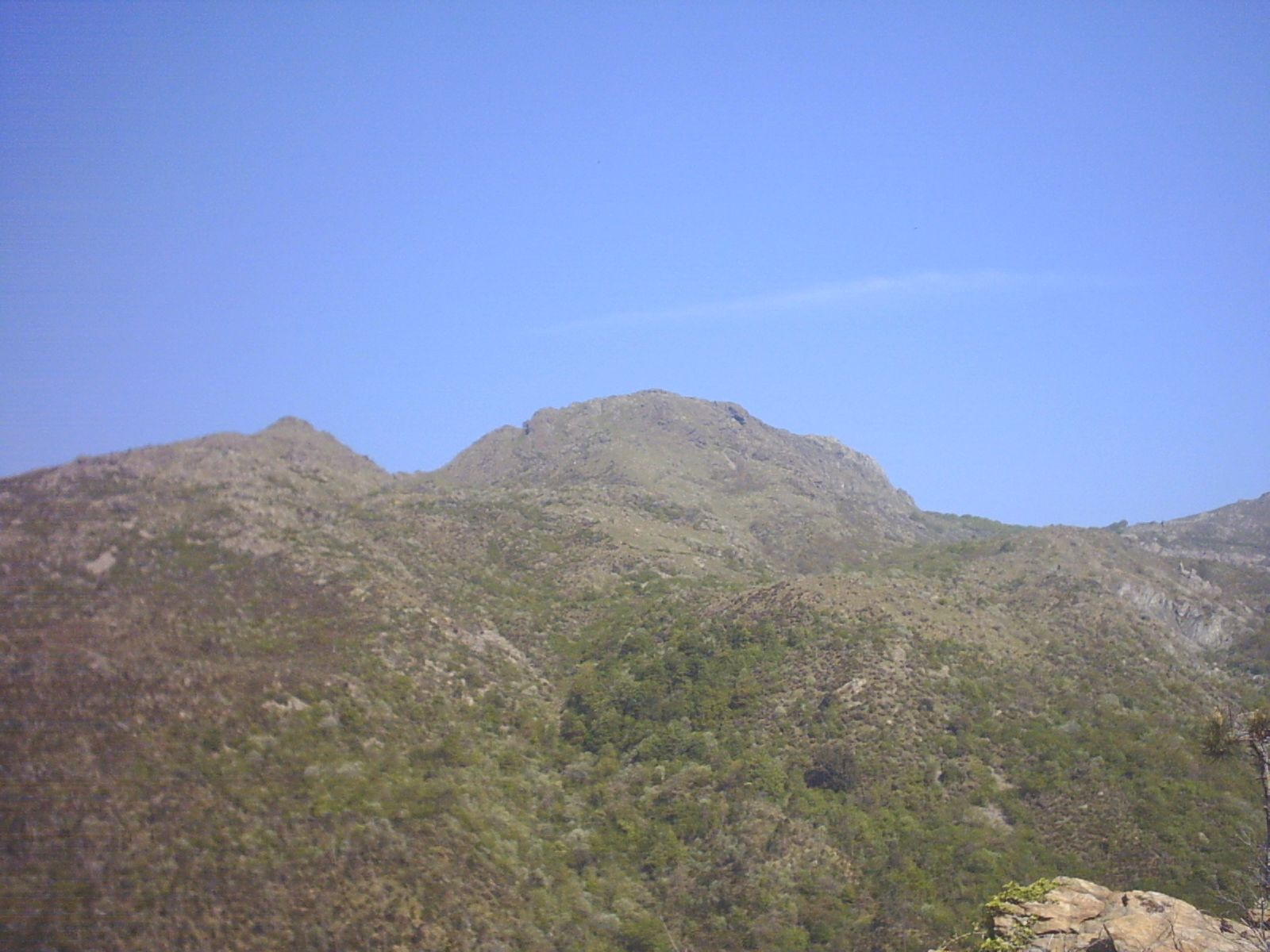 monte Beigua Cogoleto-Varazze in Liguria, Italy